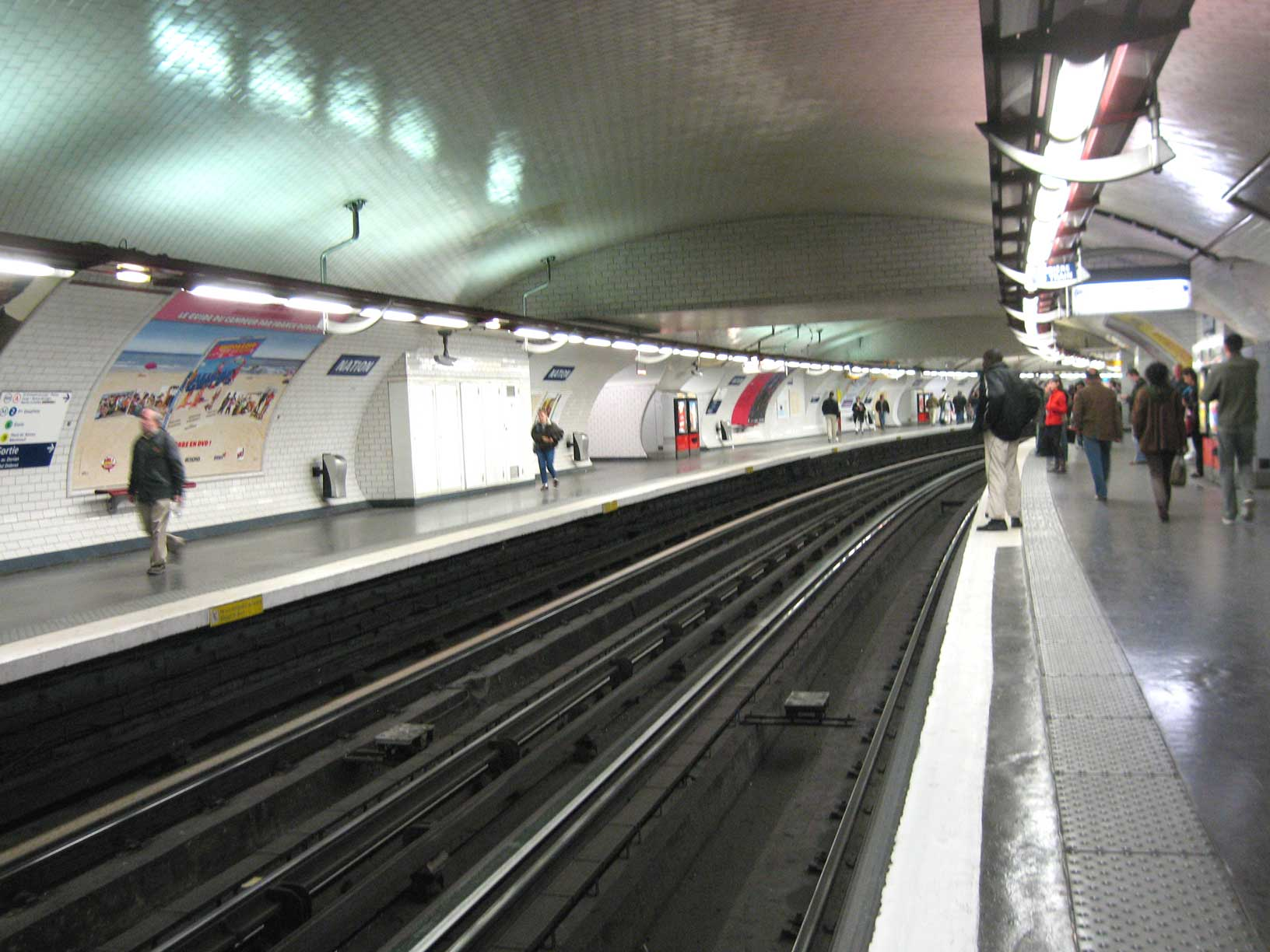 Métro de Paris, Station Nation (ligne 1), Paris, France